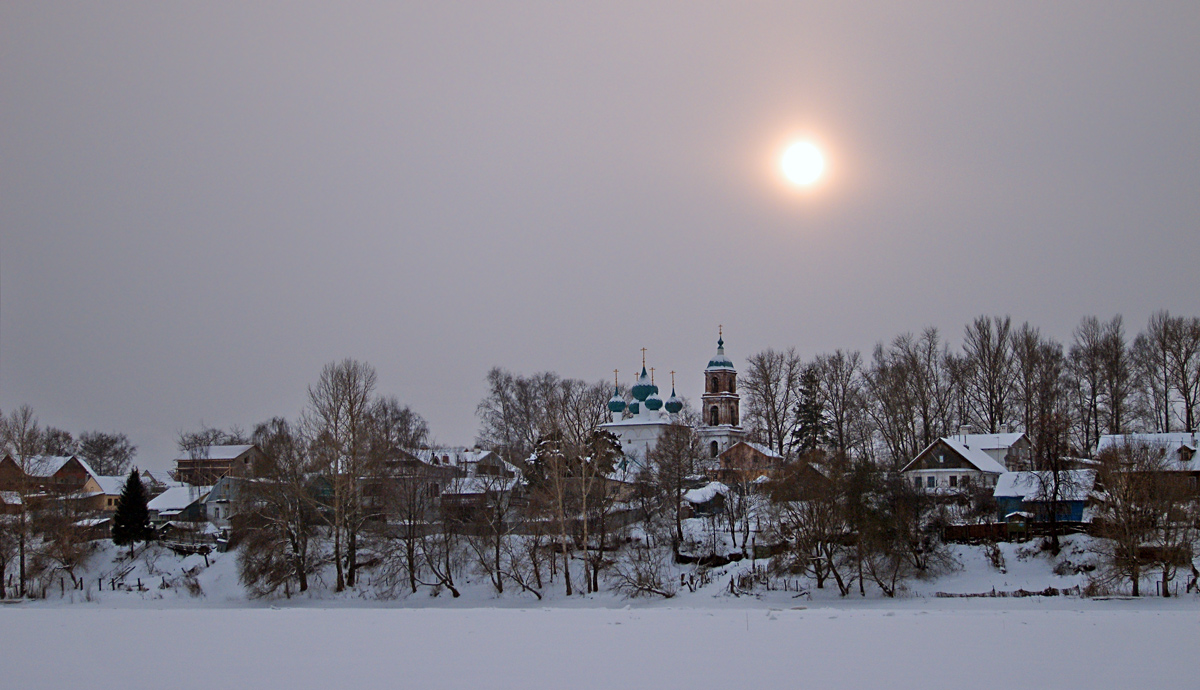 Церковь Спаса Нерукотворного Образа (Ярославская область, Ярославль, 4-я Иваньковская улица)